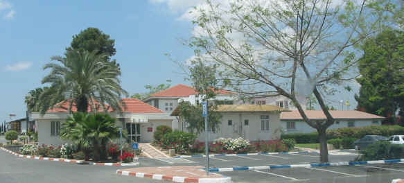 Bnei Shimeon Regional Council offices